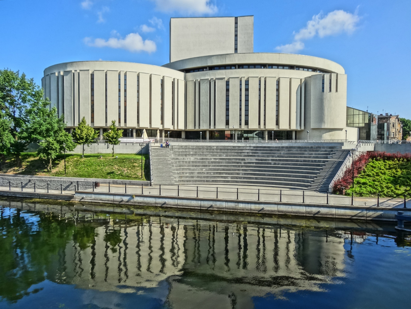 Budynek Opery Nova, zbud. w latach 1973-2006 w Bydgoszczy, ul. Ferdynanda Focha 5